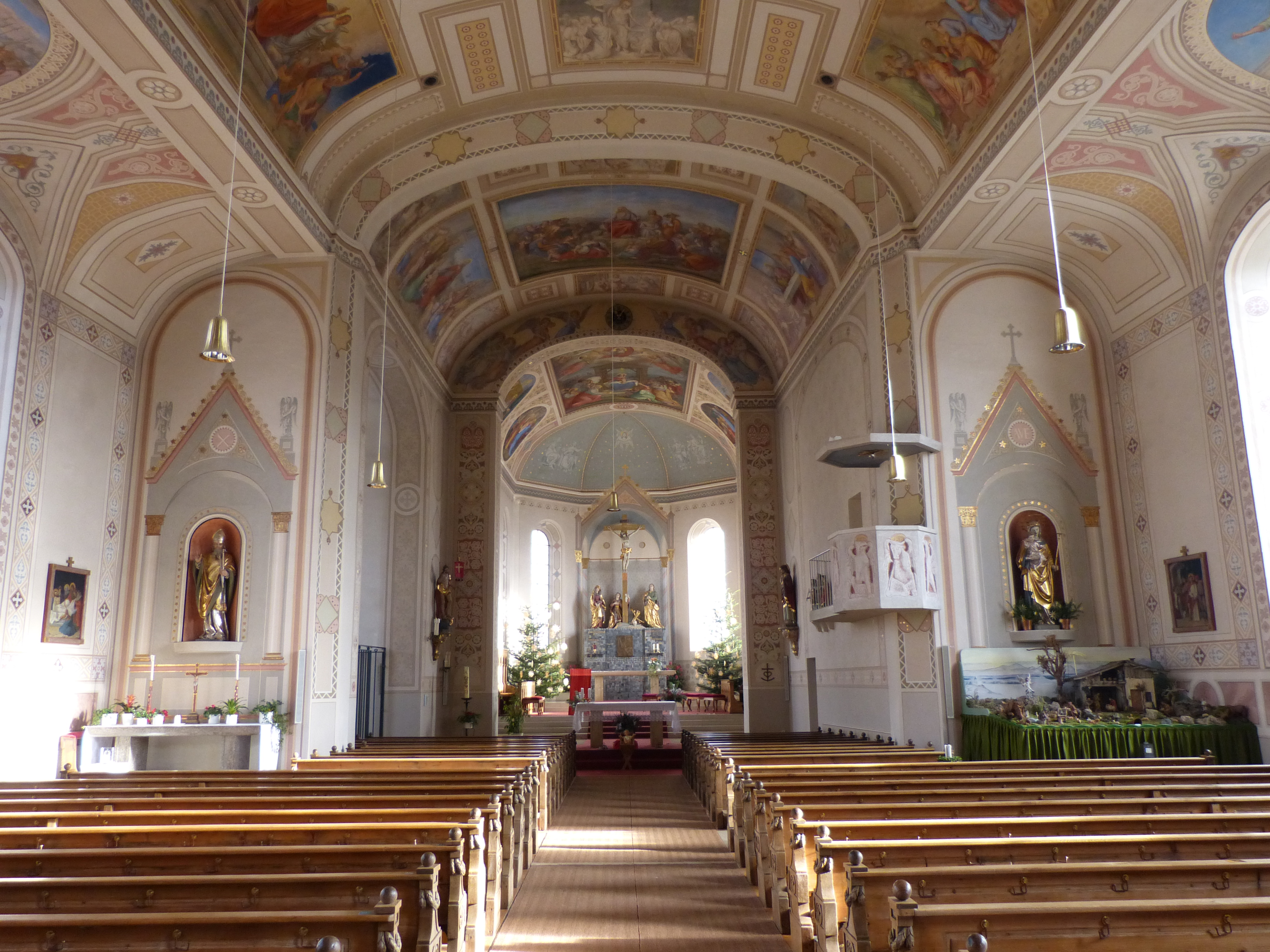 St. Blasius und Quirinus, Dietmannsried, Landkreis Oberallgäu, Bayern